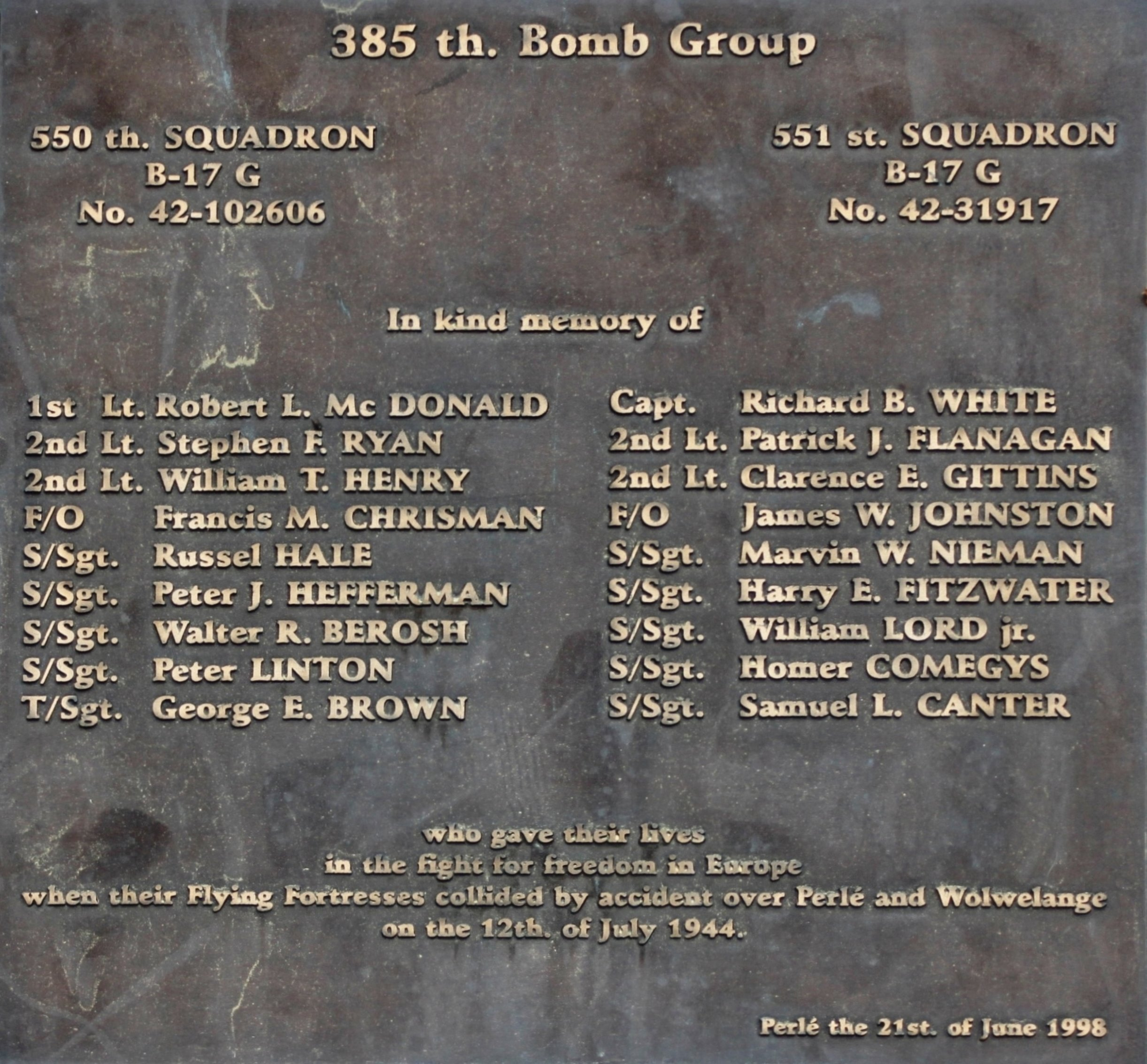 Plack um Monument vum 385. Bomb Group zu Pärel